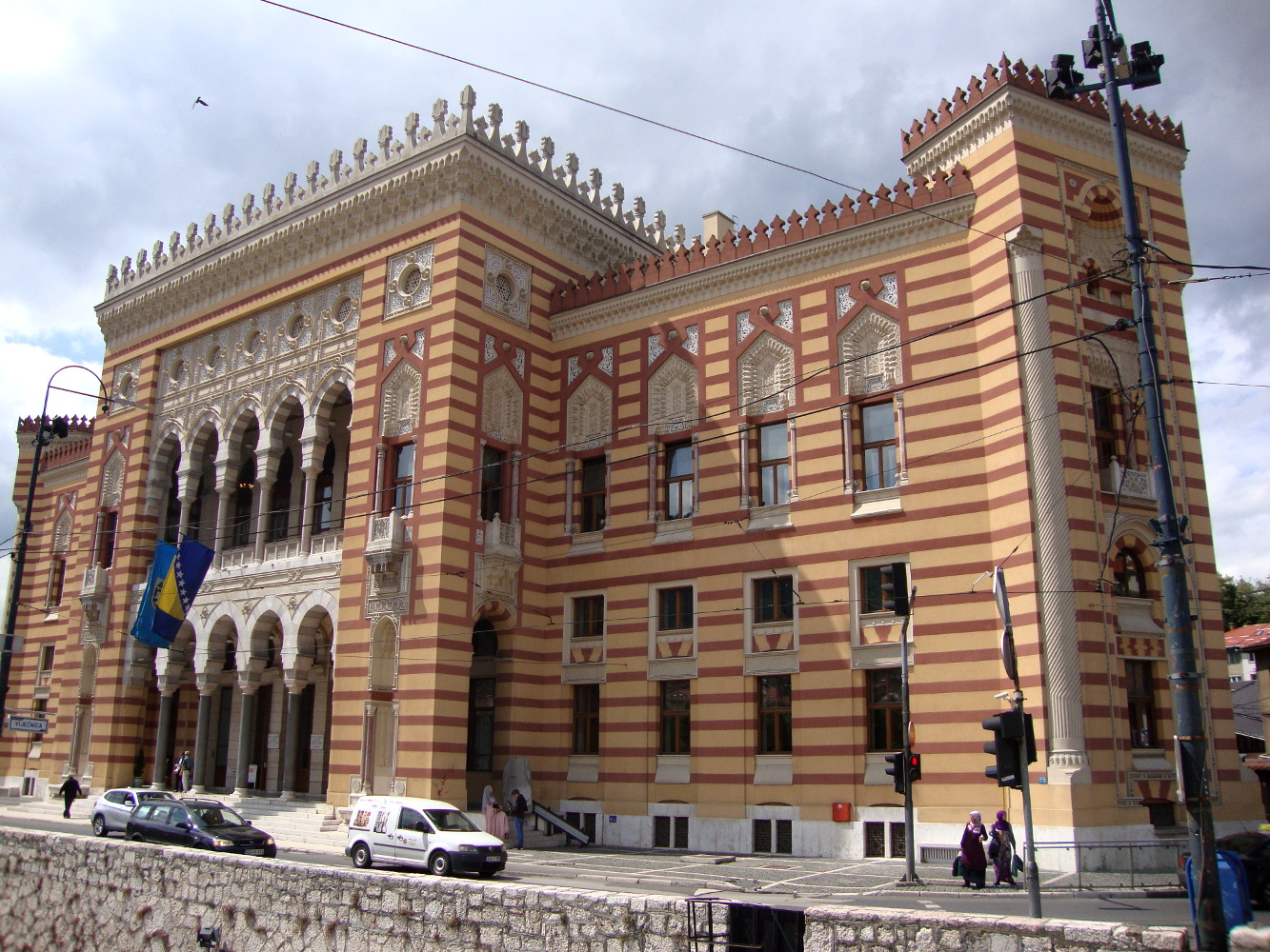 Bosnie-Herzégovine